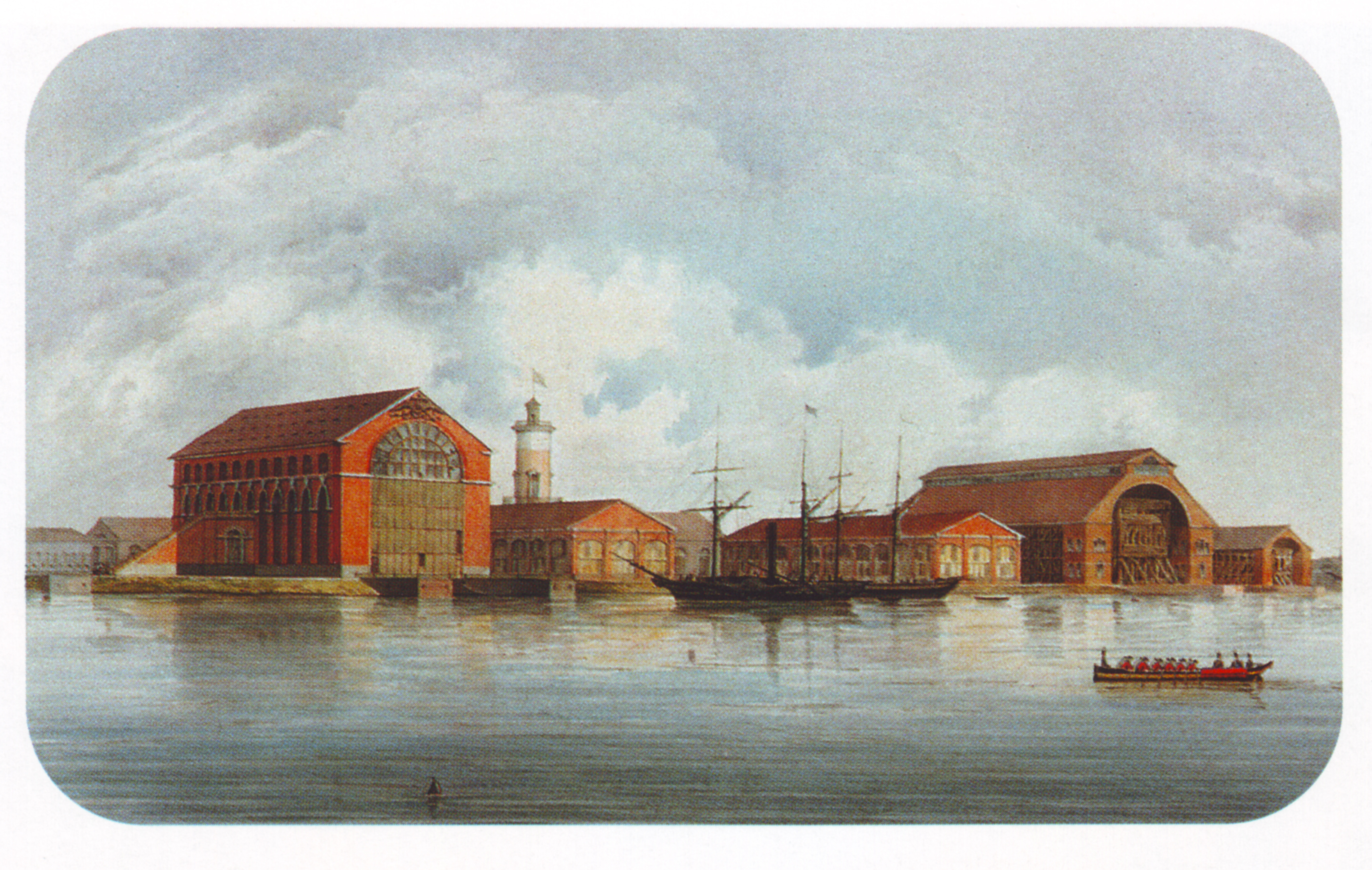 Кудинов Александр Семёнович - порт и доки (акварель)